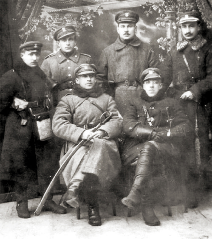 Dowództwo ochotniczego oddziału braci Dąbrowskich - luty 1919 rok. Siedzą (od lewej): mjr Władysław Dąbrowski, rtm Jerzy Dąbrowski. Sotją; W. Chmieliński, B. Kuczyński, E. Kaczkowski, J. Fiedorowicz.